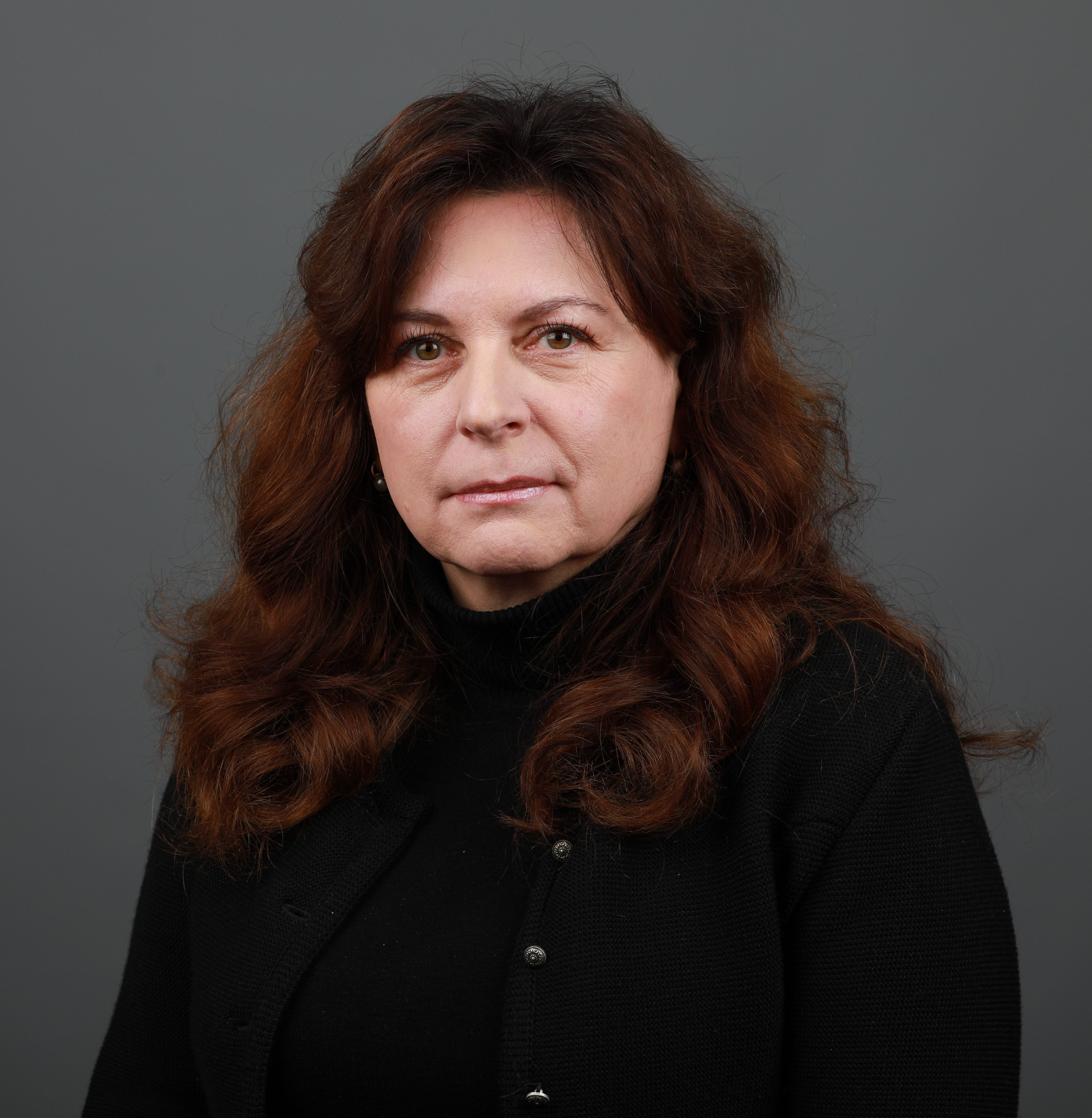 Katrin Vogel (CDU)